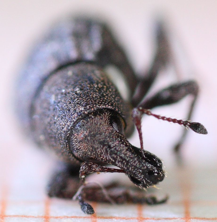 Bredsnutebilla Tropiphorus elevatus som viser hodet og de knebøyde antennene. Template:Byline